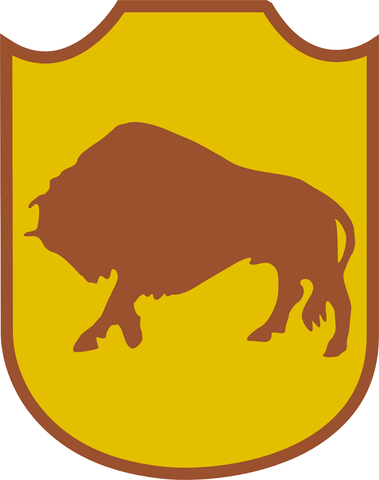 Oznaka rozpoznawcza 5 Kresowej Dywizji Piechoty Polskich Sił Zbrojnych na Zachodzie (od grudnia 1942)